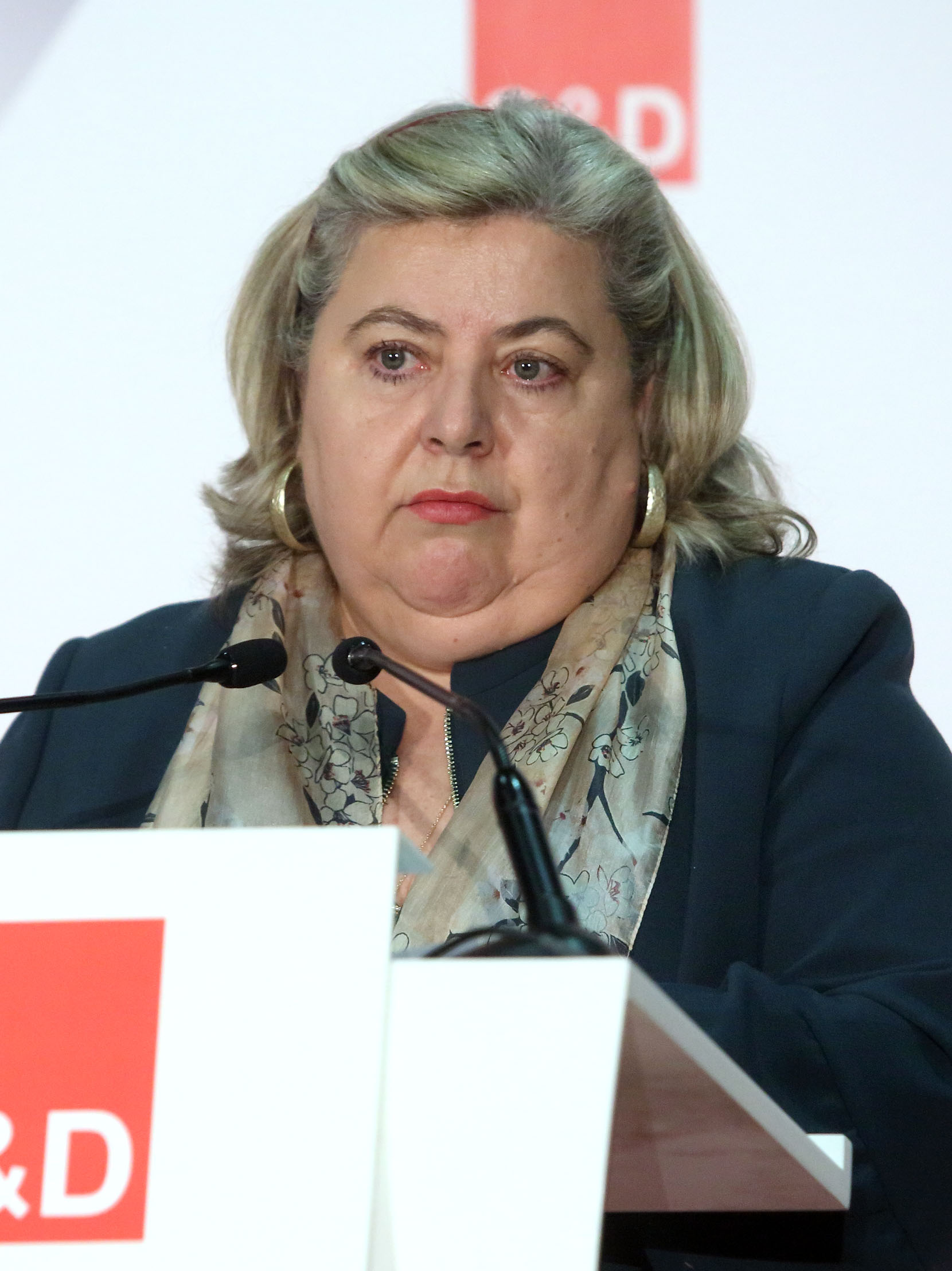 Toledo, 1 de marzo de 2019.- El consejero de Agricultura, Medio Ambiente y Desarrollo Rural, Francisco Martínez Arroyo, participa en el desayuno informativo ‘Prácticas comerciales desleales en la cadena de valor agroalimentaria y reforma de la PAC’ organizado por la delegación española del Grupo de la Alianza Progresista de los Socialistas y Demócratas en el Parlamento Europeo, en el Palacio de Congresos El Greco. En la imagen, intervención de la eurodiputada, Clara de Aguilera. (Foto: Álvaro Ruiz // JCCM)